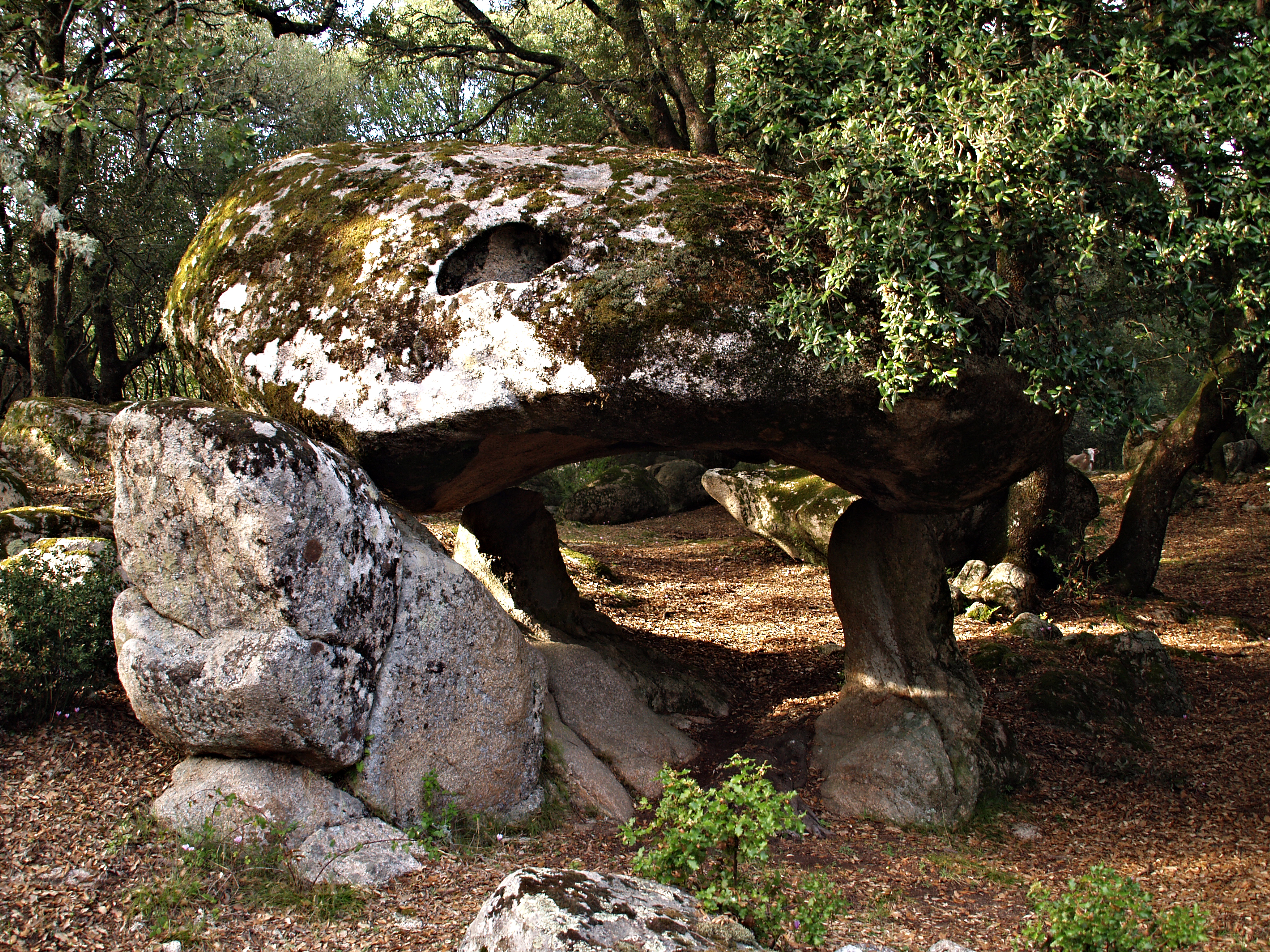 San-Gavino-di-Carbini, Alta Rocca (Corse) - Dolmen de Pacciunituli